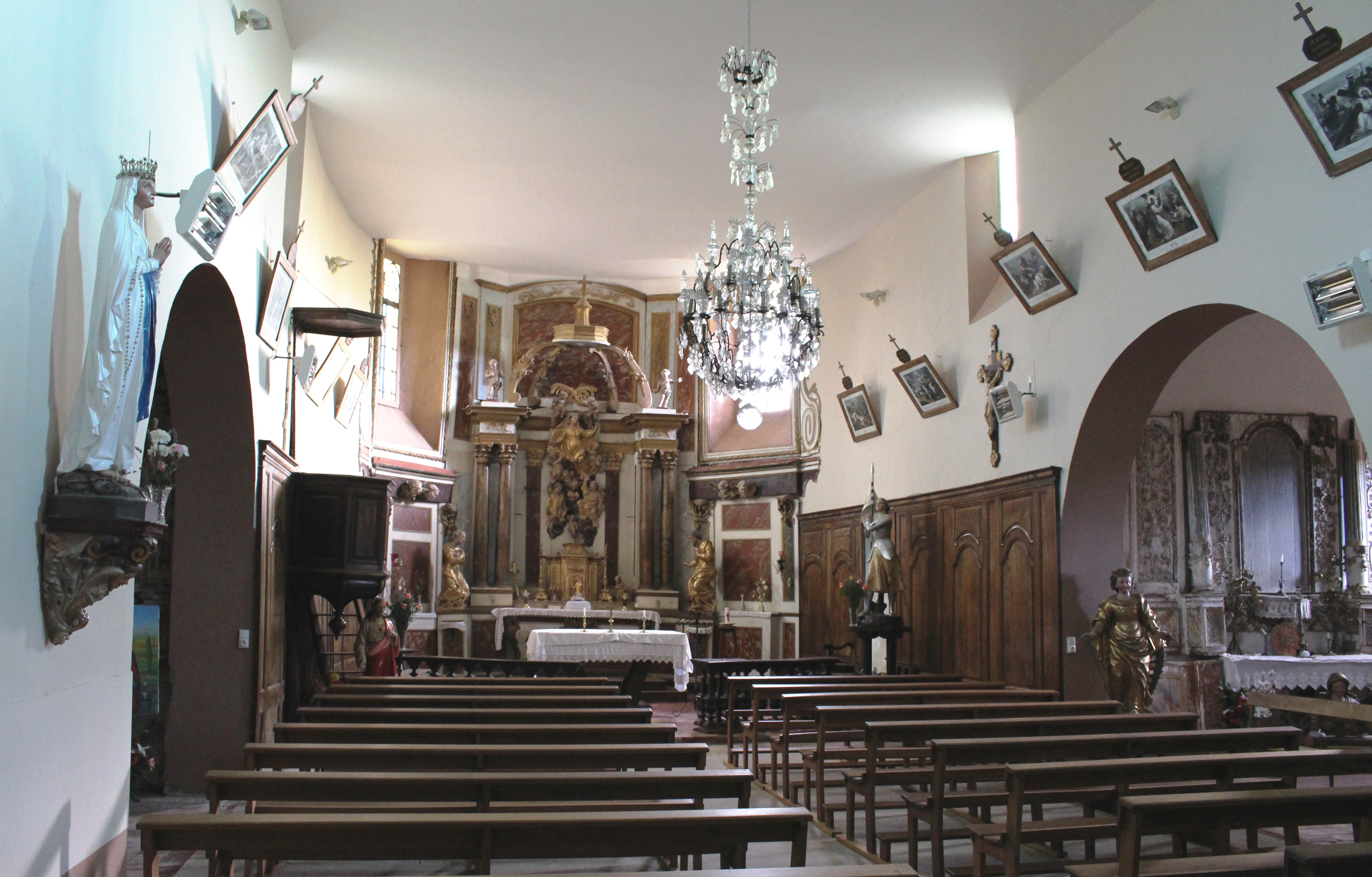 Église Saint-Pierre de Liac (Hautes-Pyrénées)